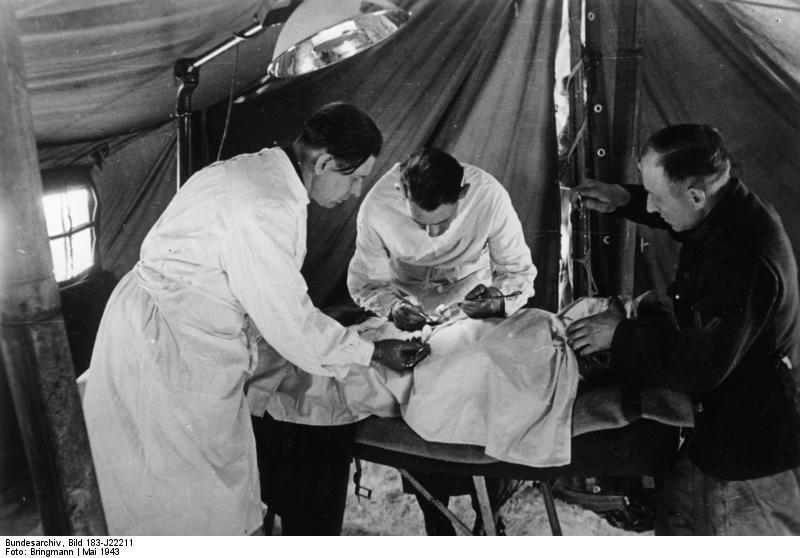 Russland, Hauptverbandplatz, Operation Scherl Bilderdienst An der Eismeerfront: Operation in unwegsamer Tundra.- Alles, was für eine Operation notwendig ist, ist im Operationszelt dieses Haupverbandsplatzes mitten in der unwegsamen Tundra vorhanden. So ist selbst an der fernen Eismeerfront eine rasche Hilfe für die Verwundeten möglich. PK: Bringmann, Mai 1943 2830-43